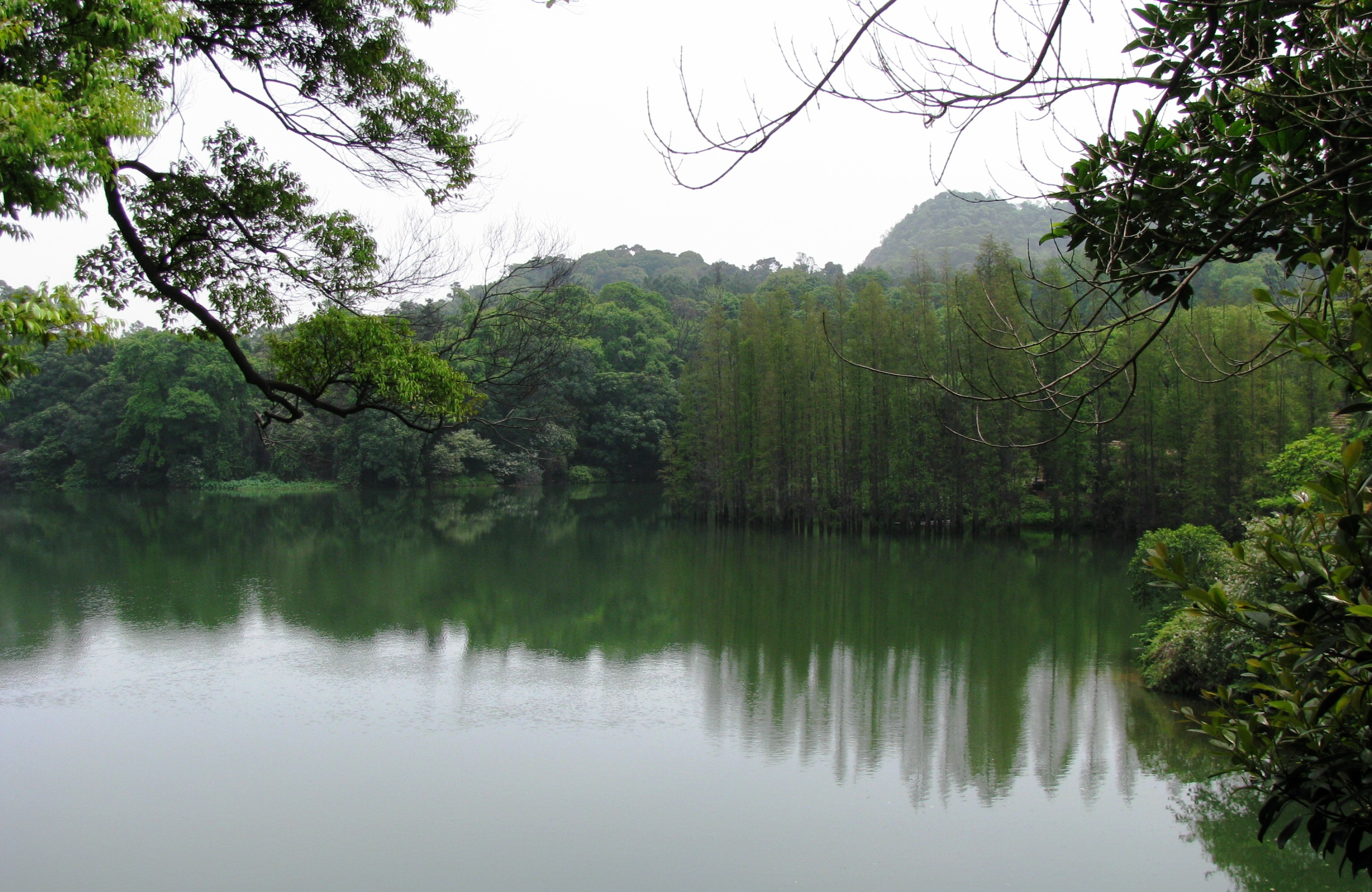 A lake in Xiqiaoshan Foshan Guangdong, China.中国广东佛山西樵山绿水青山。